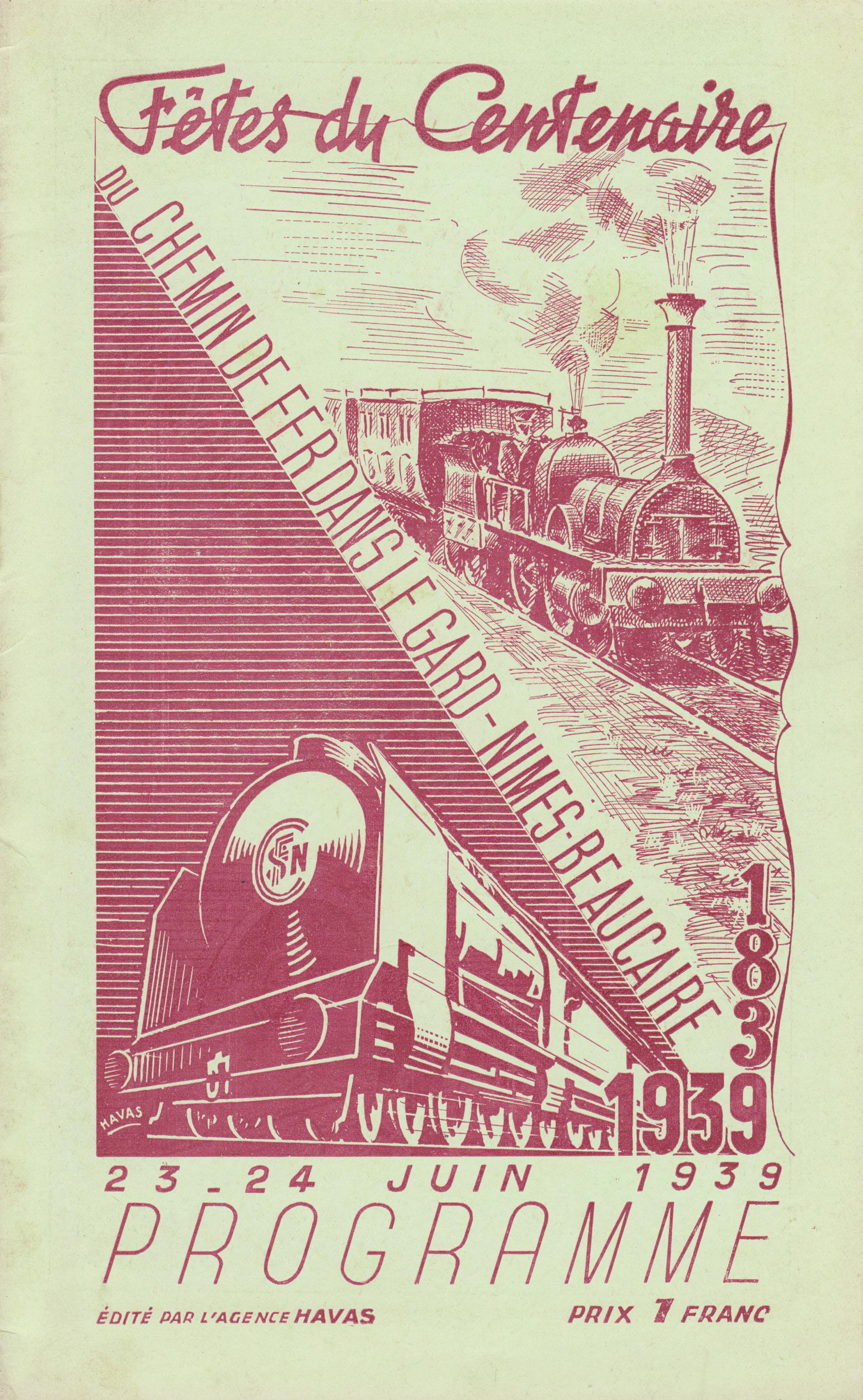 Chemin de fer du Gard. Fêtes du centenaire.